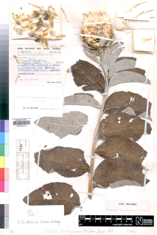 Ochrocephala imatongensis como Centaurea imatogensis, espécimen de Uganda en el Herbario del Natural History Museum, London